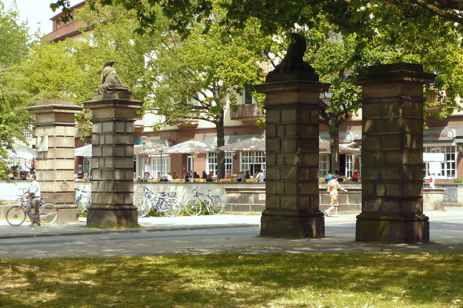 Neues Tor Hannover